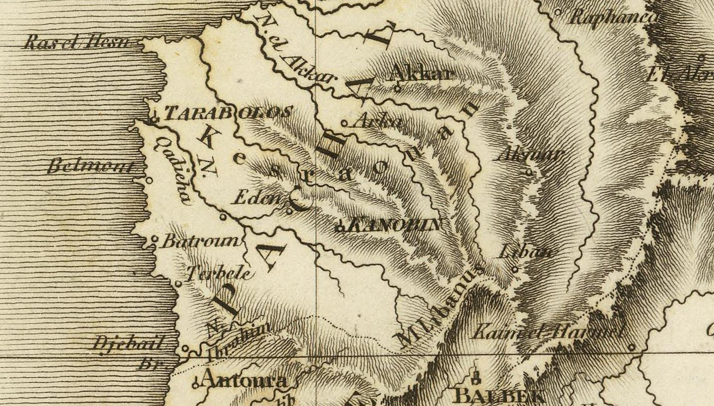 Extrait de "Palestine and Syria, Syria Antiqua et Palaestina", éditée en 1814 par le Dr. Playfair, montrant Belmont